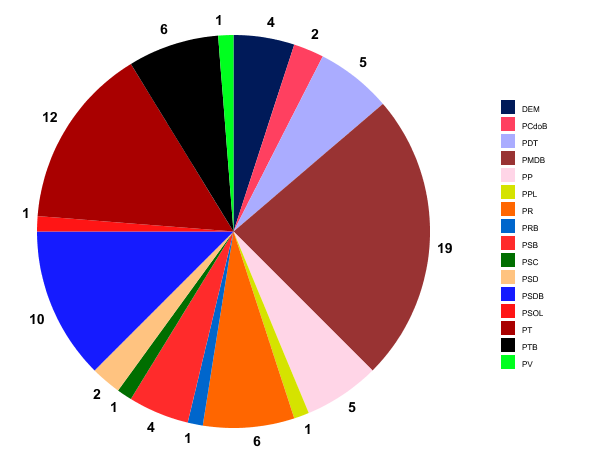 Divisão partidária do Senado Federal Brasileiro em dezembro de 2012.